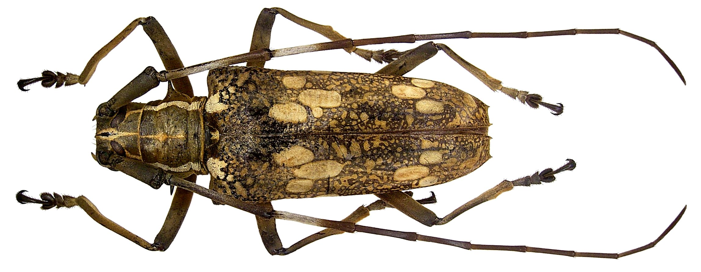 Familie: Cerambycidae Groesse: 36 mm Fundort: Indonesien, Sumatra, 2006 det. A.Weigel, 2006 Photo: U.Schmidt, 2008